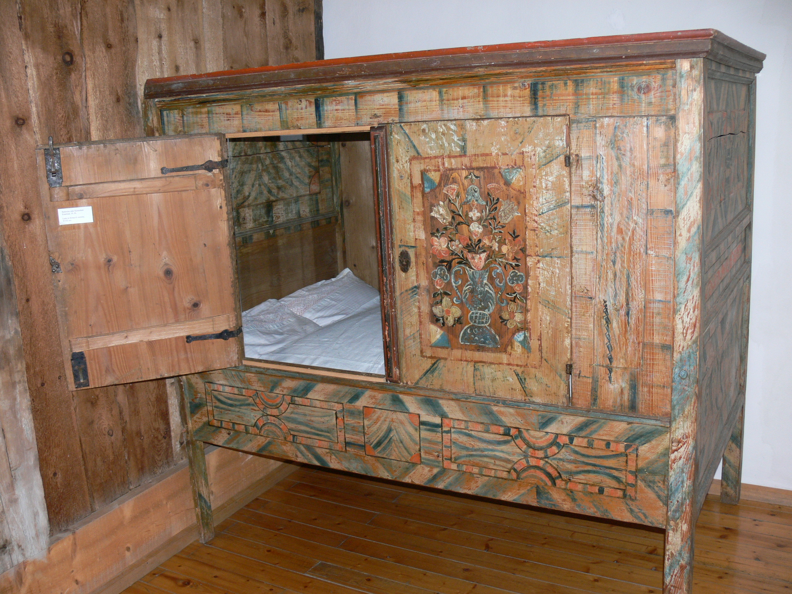 Volkskundemuseum Dietenheim in Südtirol. Bemaltes Kastenbett ( 18.Jhdt. )